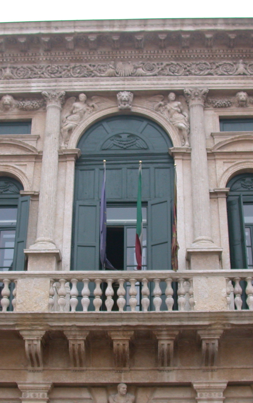 Verona, "Palazzo Bevilacqua" (palace of Bevilacqua's family)